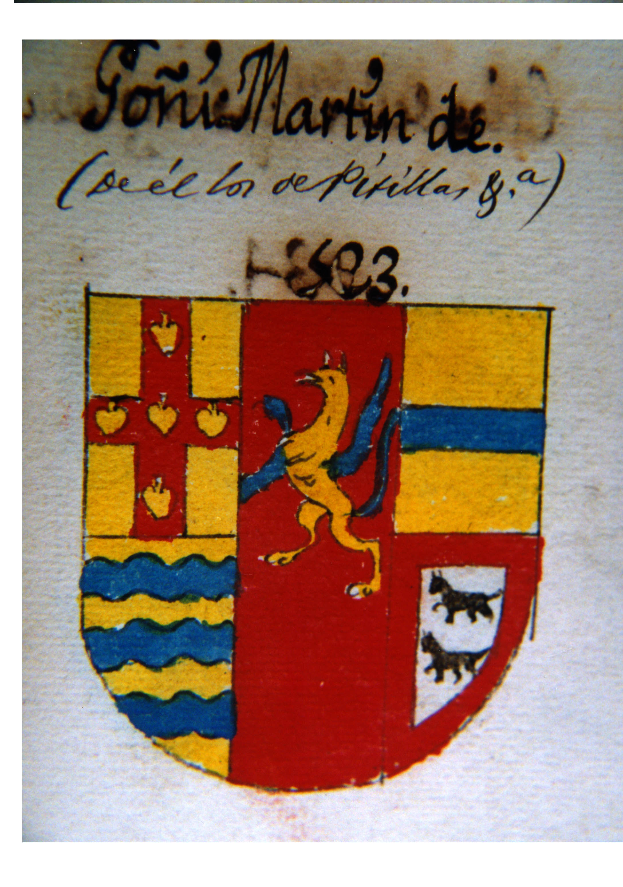 Escudo de oro con una cruz bermeja y cinco panelas de oro,puestas a manera de cruz en la dicha cruz bermeja.(Cf. J.J. MARTINENA RUIZ, Libro de Armeria del Reino de Navarra, 17.1:54.2; 71v.4. Noviliario del Reino de Navarra, I,Madrid 2002, p.114.)